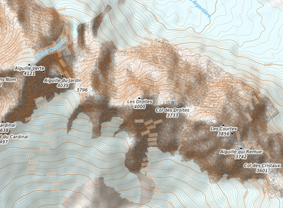 carte réalisée sur umap This map may be incomplete, and may contain errors. Don't rely solely on it for navigation.